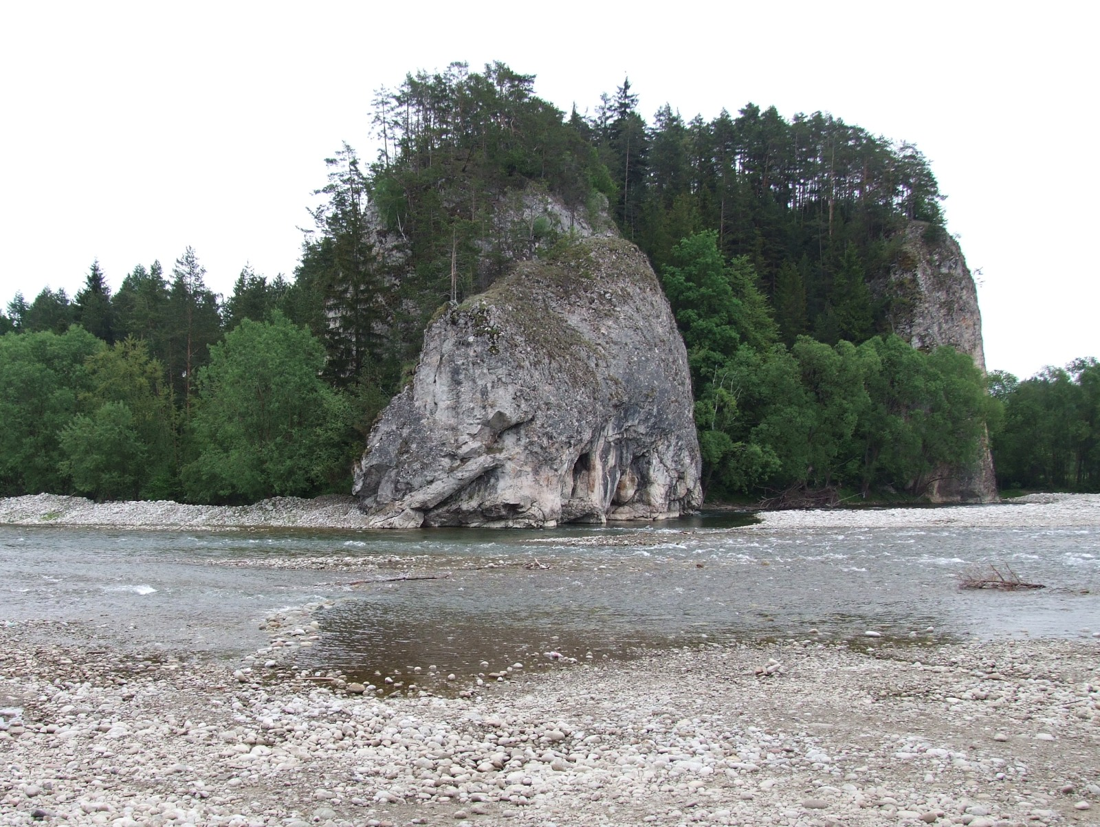 Kramnica w Przełomie Białki pod Krempachami